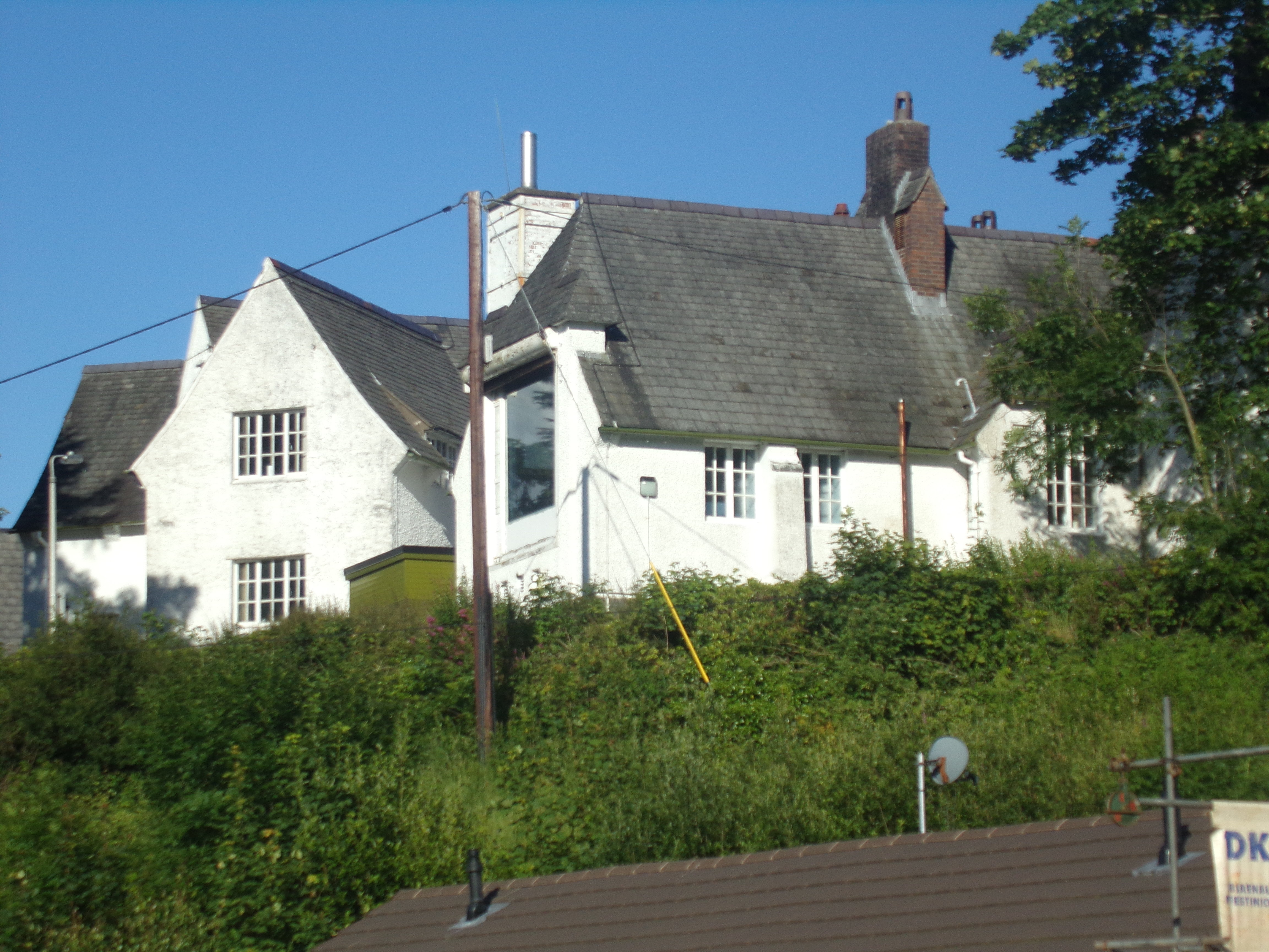 Ysbyty Dolgellau & Abermaw Dolgellau & Barmouth Hospital